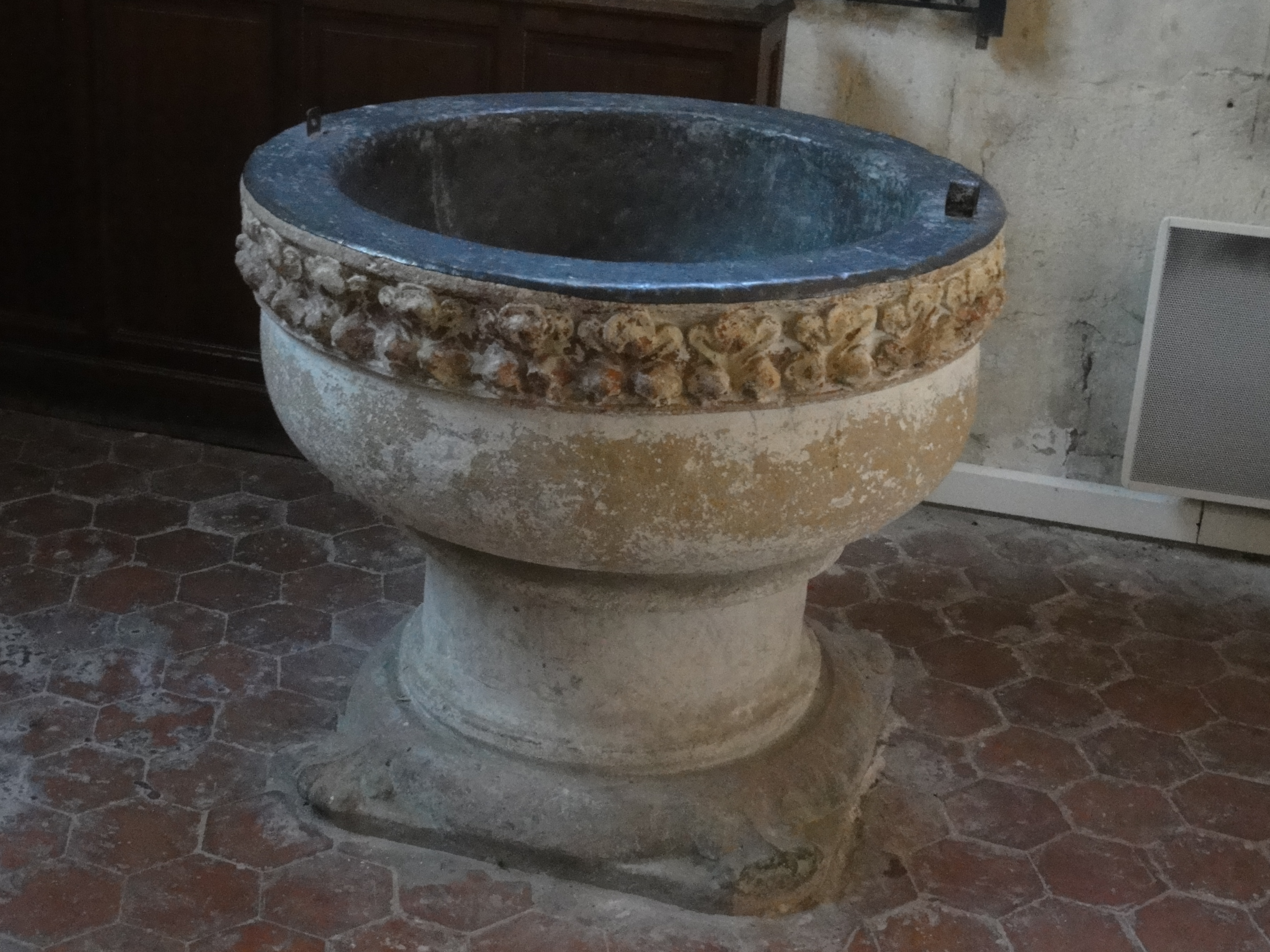 Fonts baptismaux.